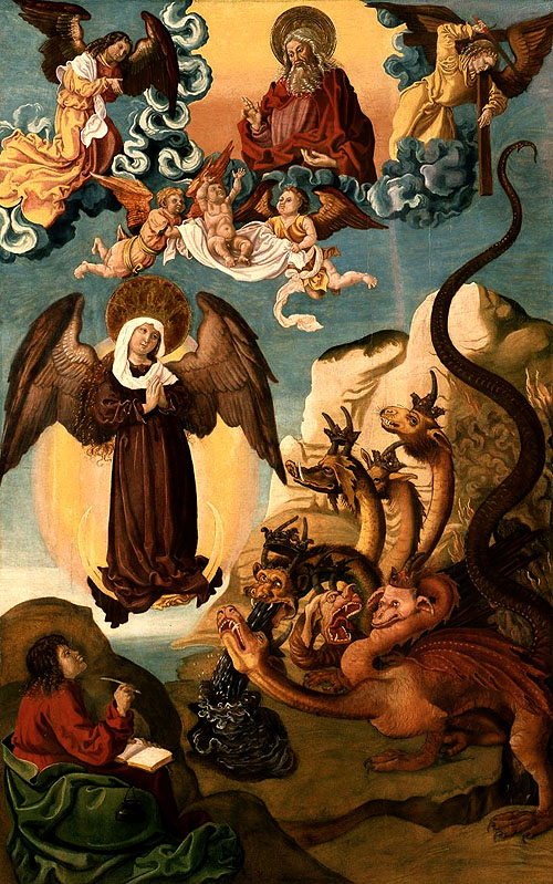 Mujer vestida de sol / mulier amicta sole